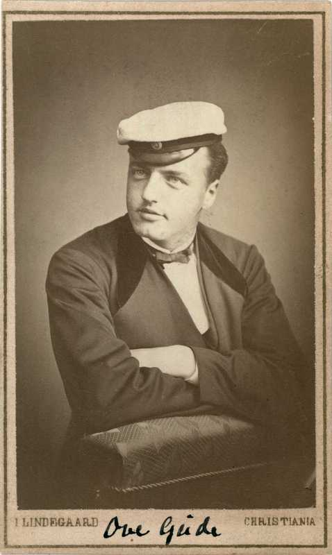 Ove Gude (1853-1910), norsk diplomat, sønn av maleren Hans Gude og bror av maleren Nils Gude, portrett, mann, kammerherre, minister, brystbilde, studentlue.